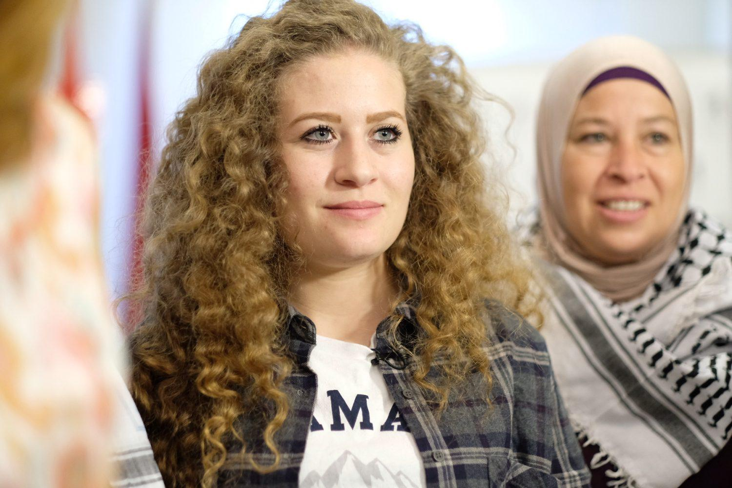 El tercer teniente de alcalde Mauricio Valiente, se ha reunido esta mañana con la activista palestina Ahed Tamimi, en un encuentro en el que ha querido mostrar el compromiso y la solidaridad del Ayuntamiento de Madrid con el pueblo palestino y con los Derechos Humanos y el Derecho Internacional. Valiente ha presentado a Tamimi como “ejemplo de lucha en defensa de los Derechos Humanos en general y de la causa palestina en concreto, representada hoy en ella”.